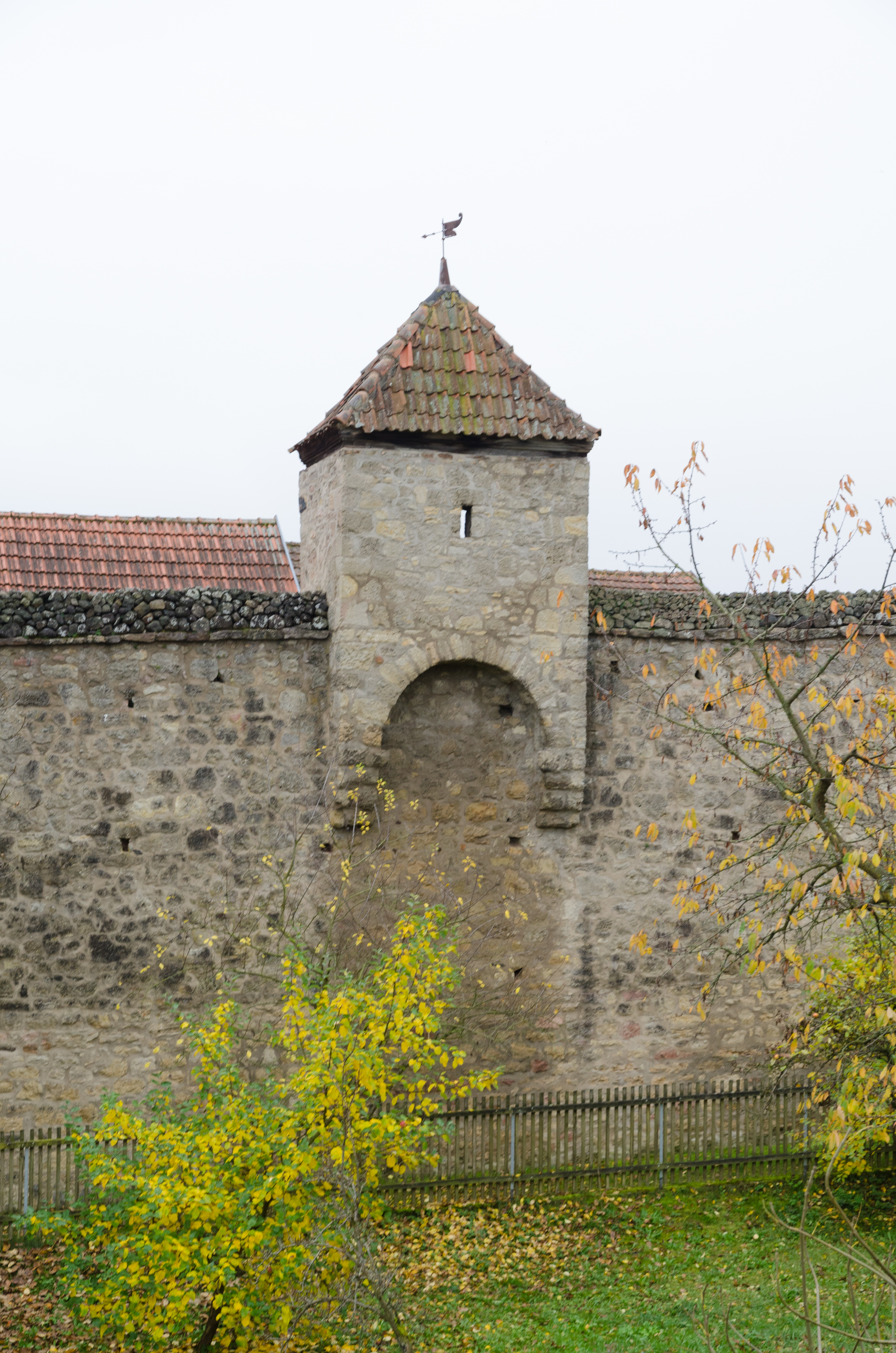 Stadtmauer Flandungen